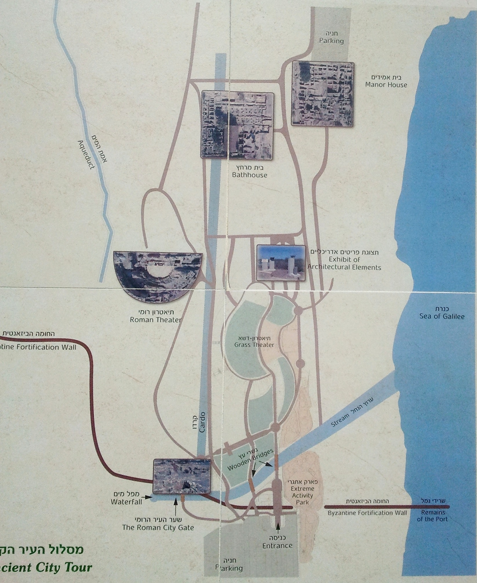 מפת הפארק הארכאולוגי שוכן בדרום טבריה